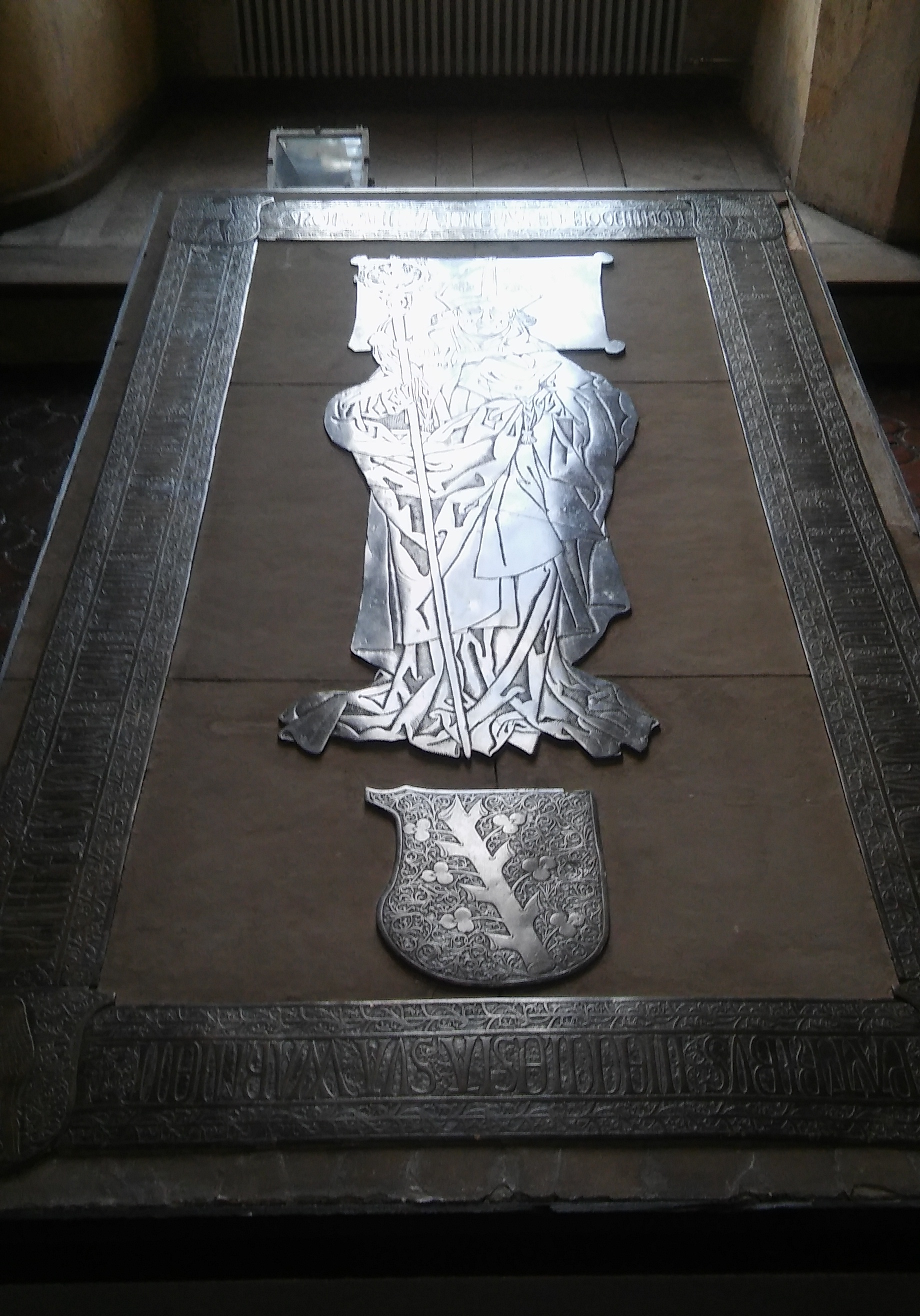 Lidzbark Warmiński - płyta nagrobna biskupa Pawła Legendorfa, obecnie znajduje się w reflektarzu zamku biskupego